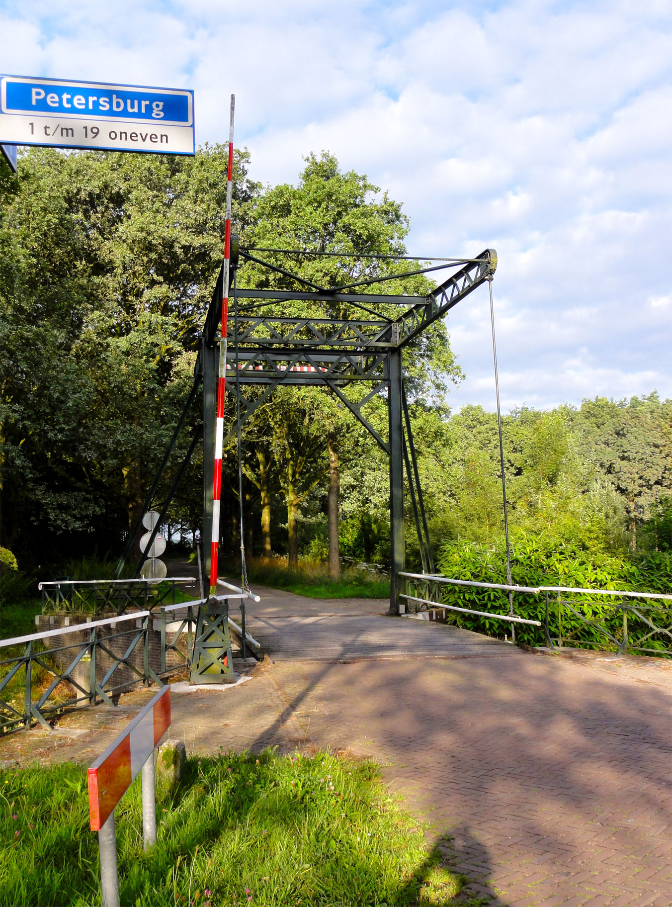 Petersburg in de gemeente Ooststellingwerf (brug over de Opsterlandse Compagnonsvaart)